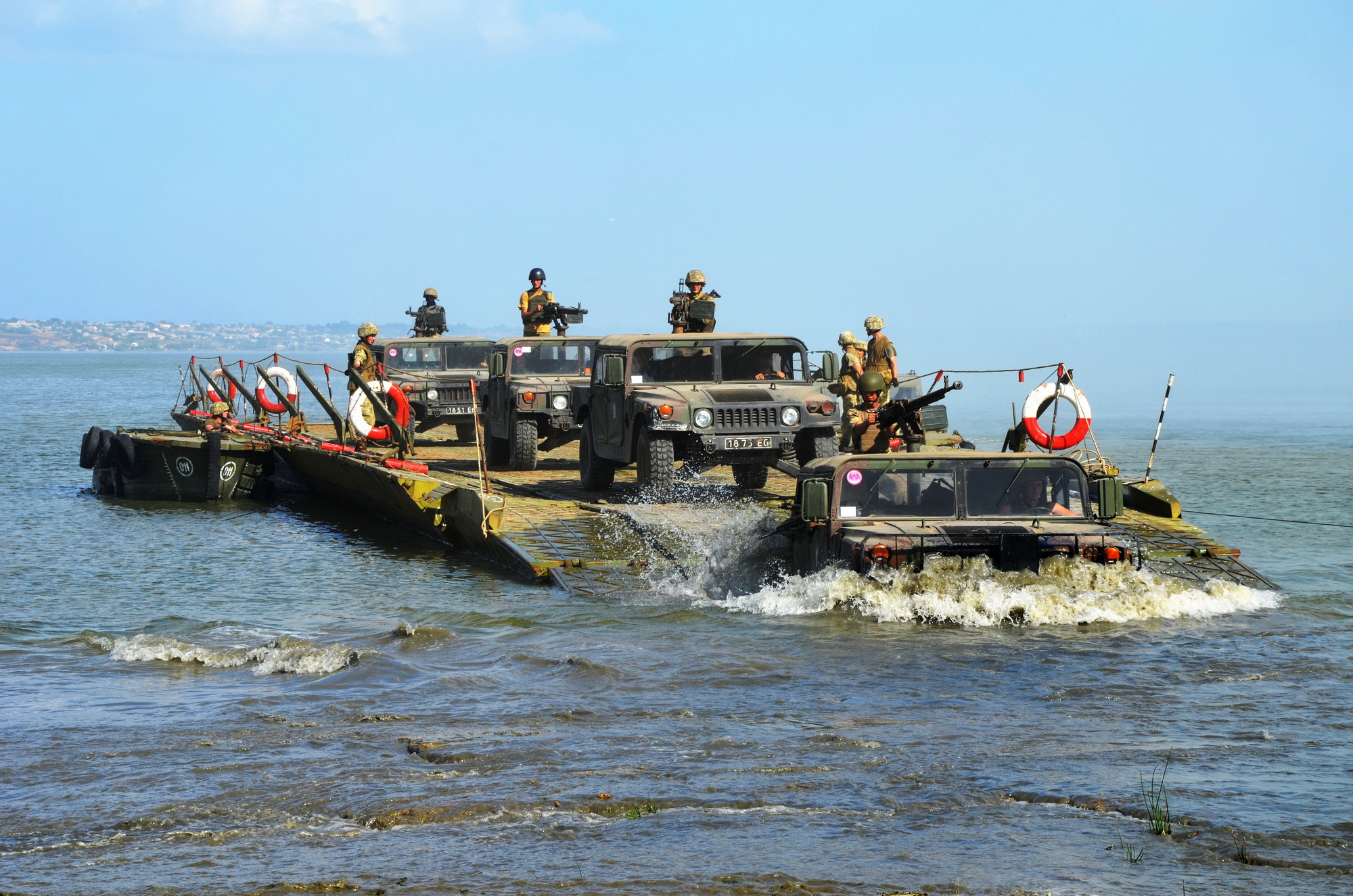 Висадка Хамві 36-ї окремої бригади морської піхоти